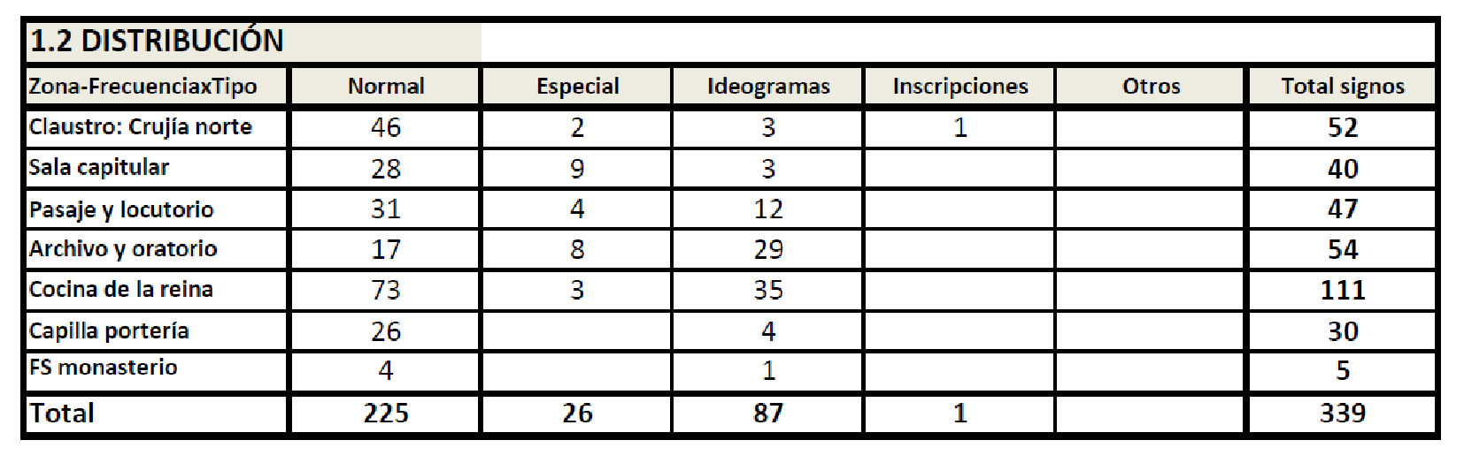 Carracedo del Monasterio (León) España. Igl. de Sta. María s XII-XIII. Distribución de Signos lapidarios.